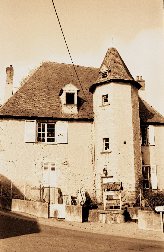 Collége de Brugheas vue de façade